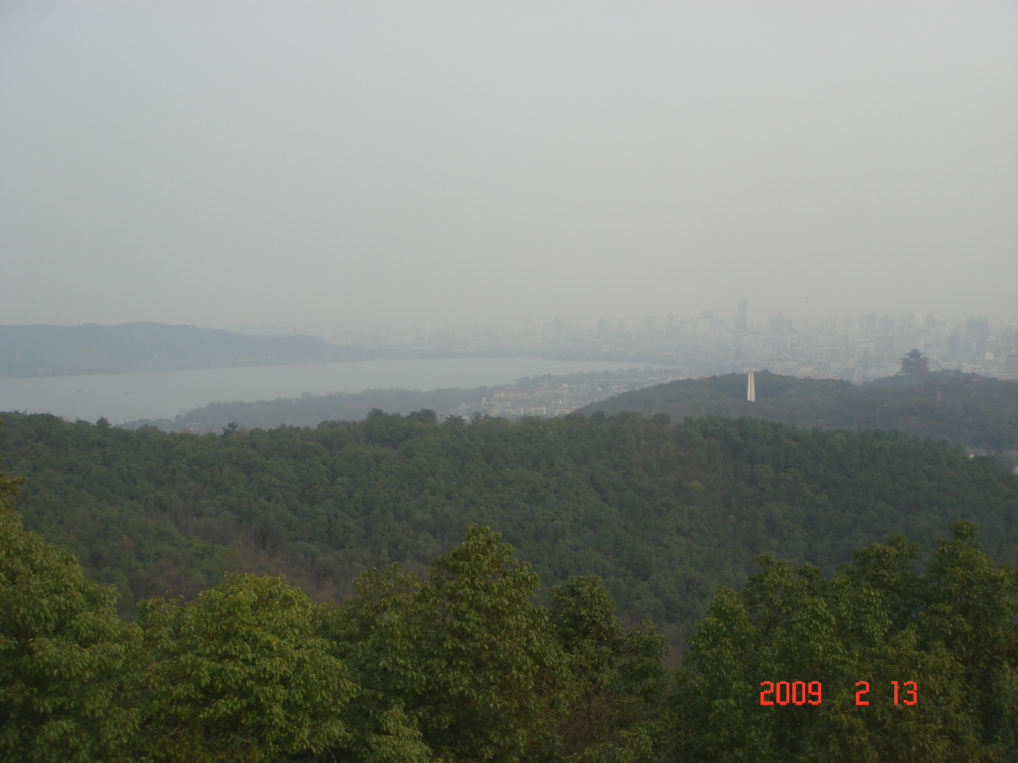 杭州. 登凤凰山（凤凰亭.远眺：西湖. 城隍阁...）